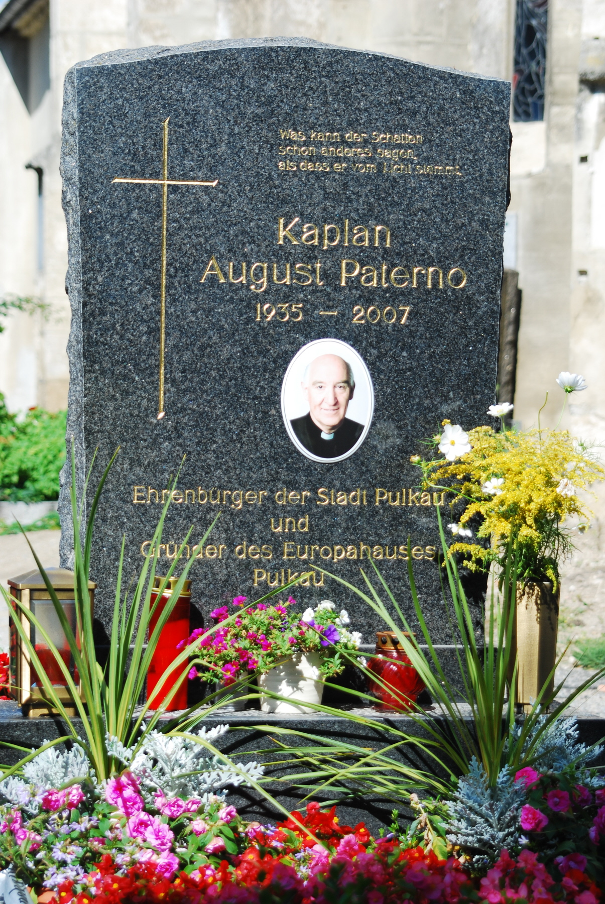 Grab von August Paterno auf dem Friedhof von Pulkau in Niederösterreich